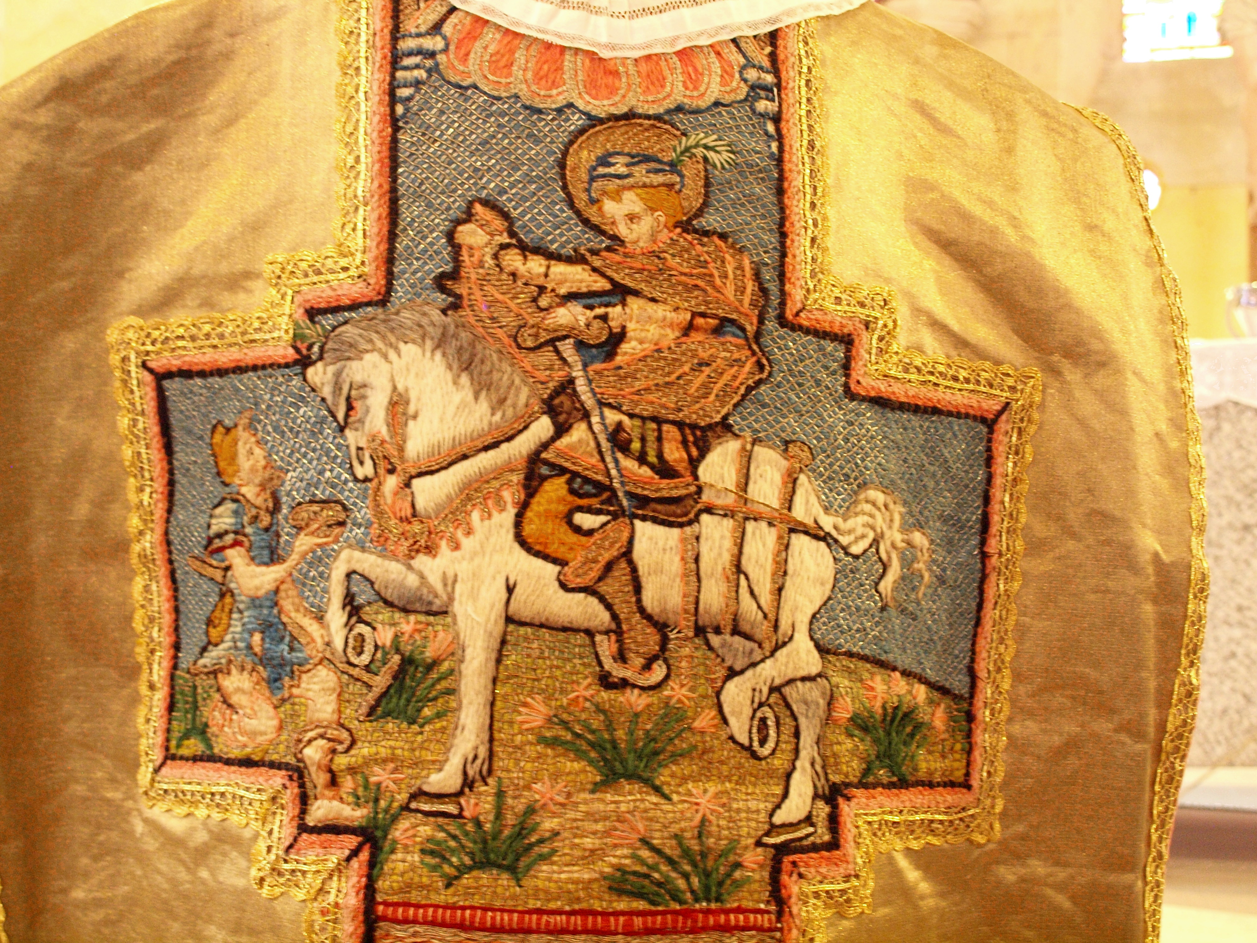 Église Saint-Martin de Champigny (Yonne, France), chasuble du XVIIIe siècle qui représente Saint Martin.